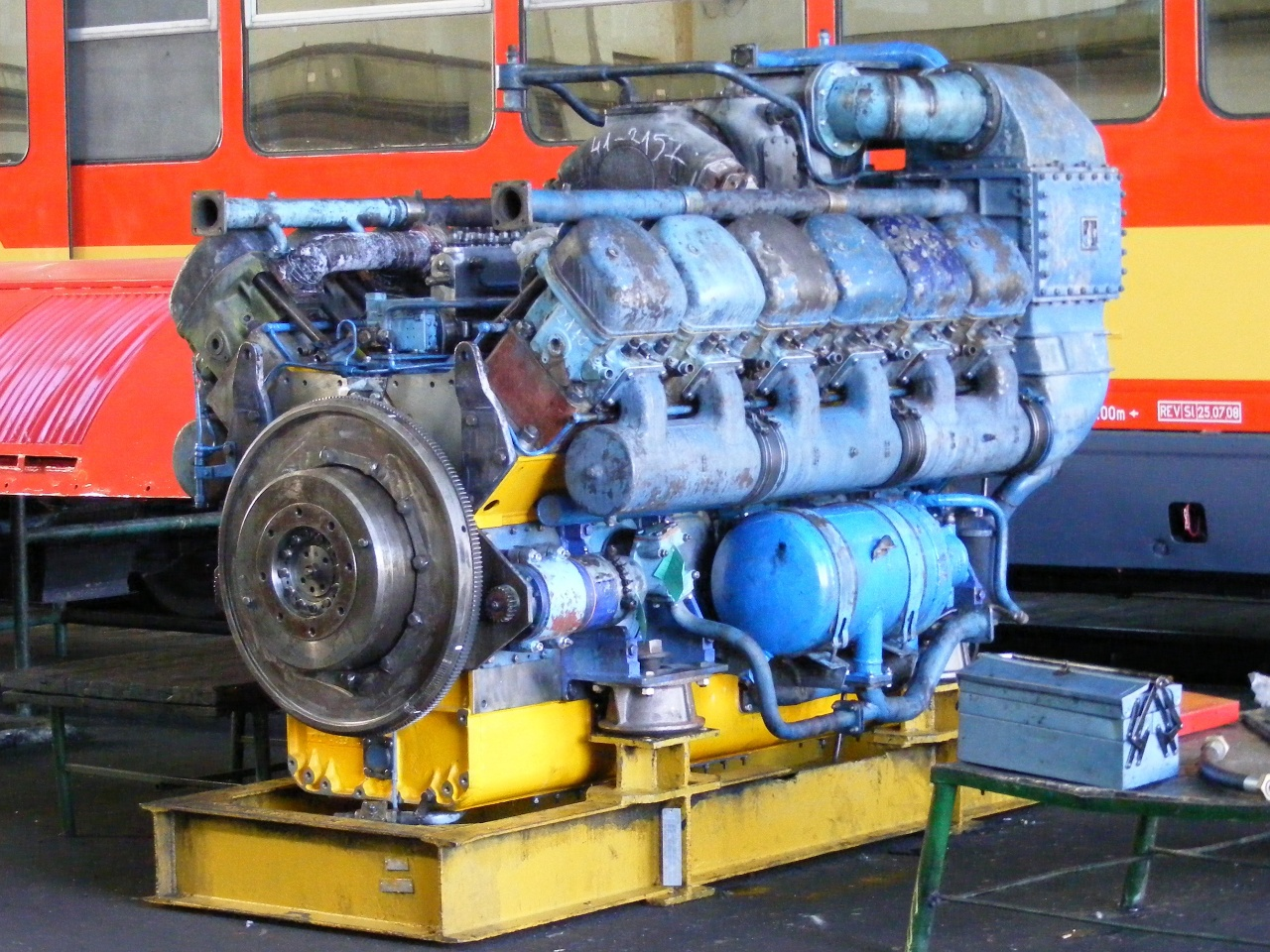 Hagyományos Pielstick 12 PA4 185 dízelmotor kiszerelve egy M41-esből (helyszín: Dombóvár)